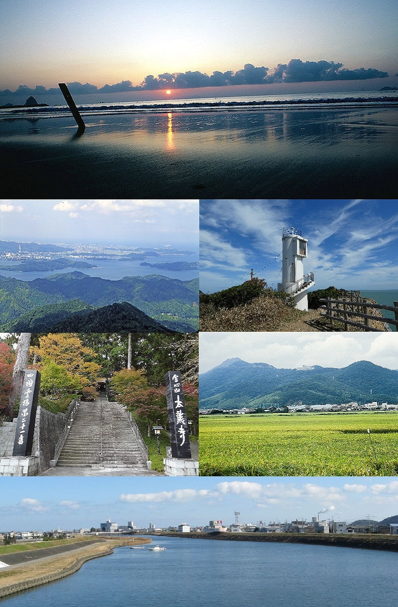 徳島県阿南市のモンタージュ。